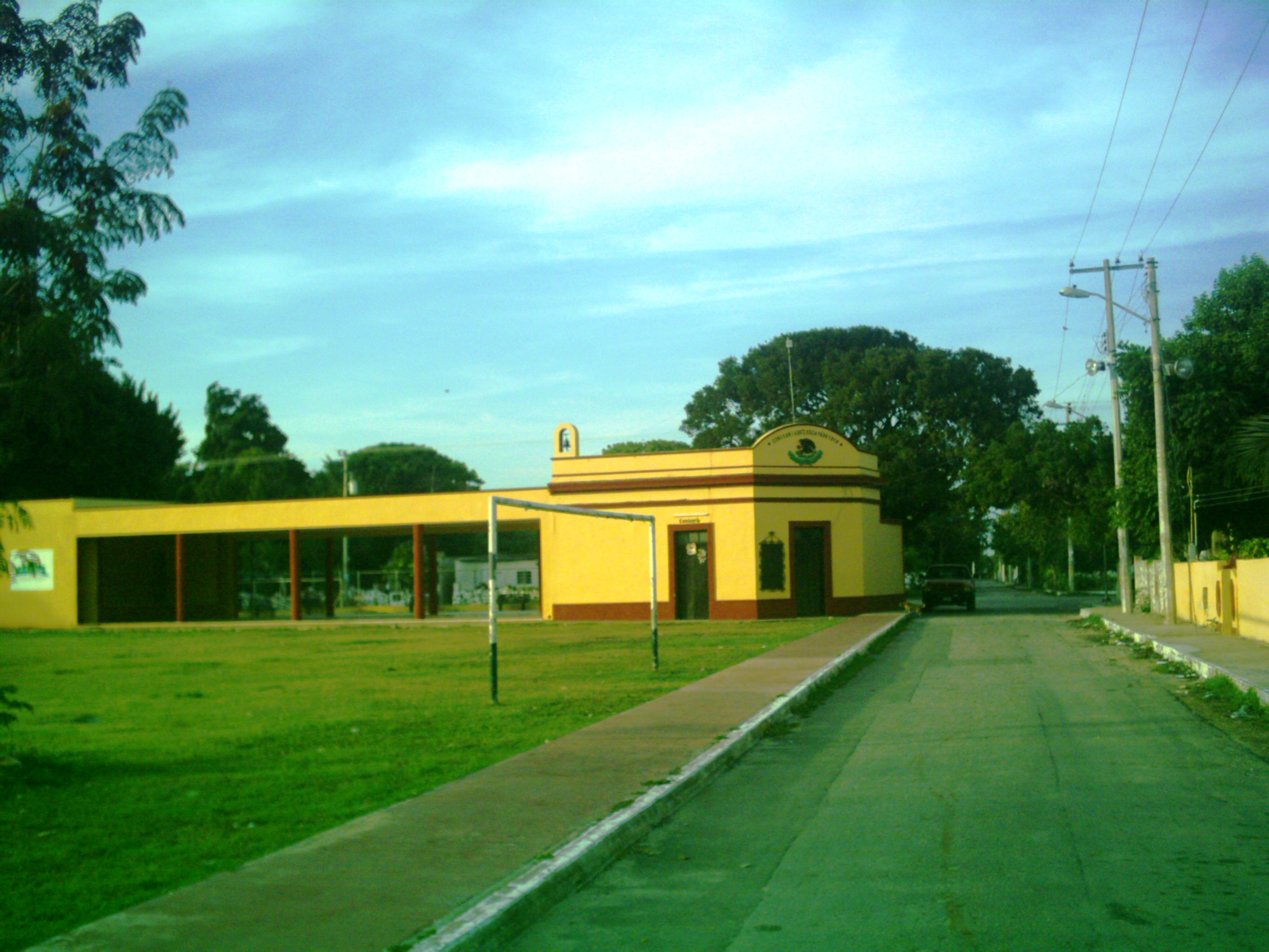 Palacio de la comisaría de Cosgaya, Yucatán.